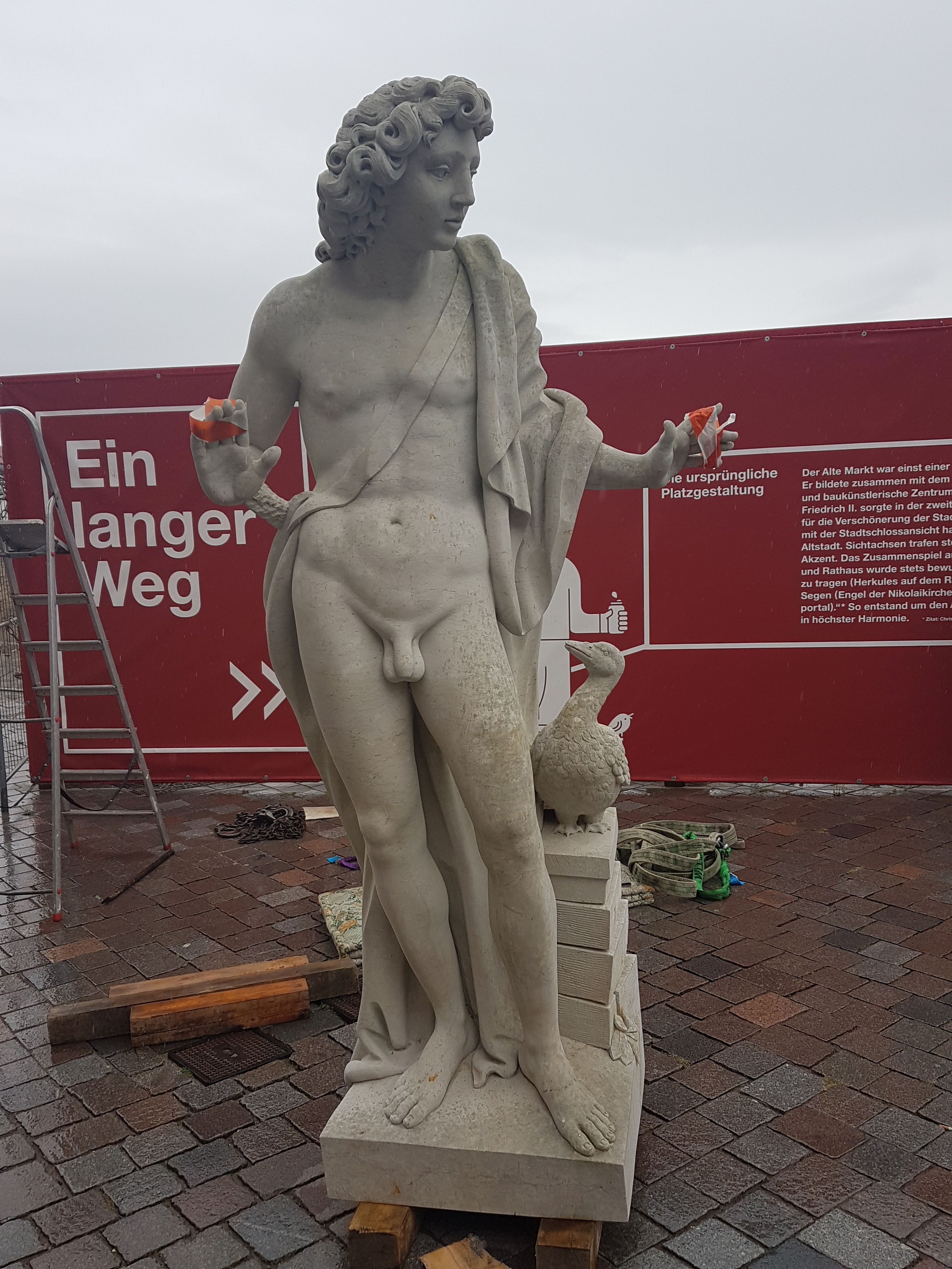 Figur kurz vor dem Aufsetzen auf das Potsdamer Landtagsschloss